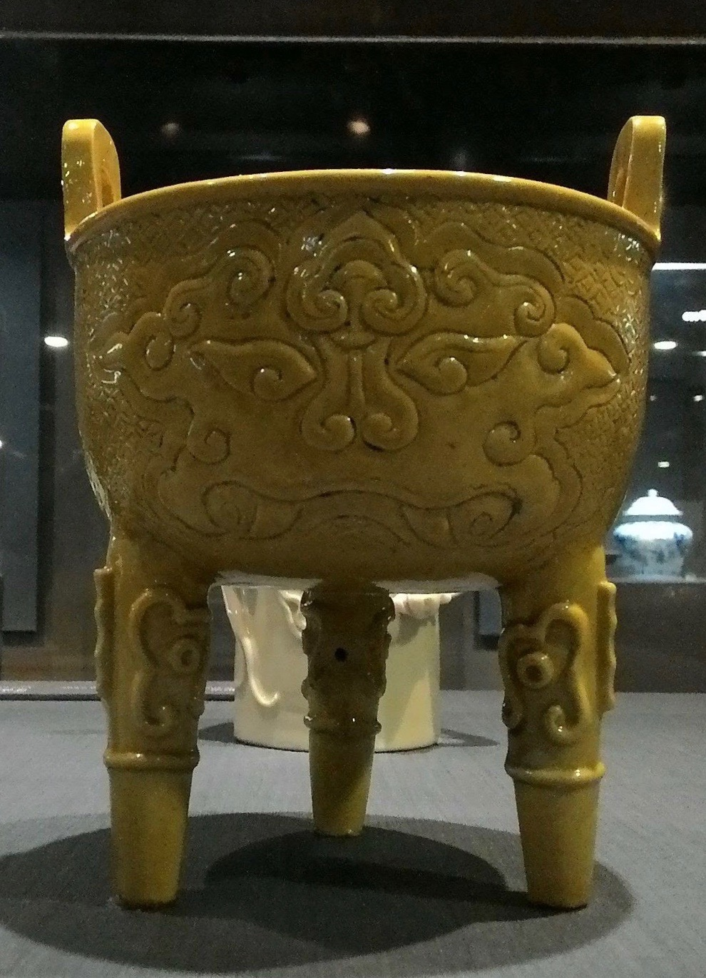 中文（台灣）: 嬌黃錐拱獸面紋鼎 「周丹泉造」款